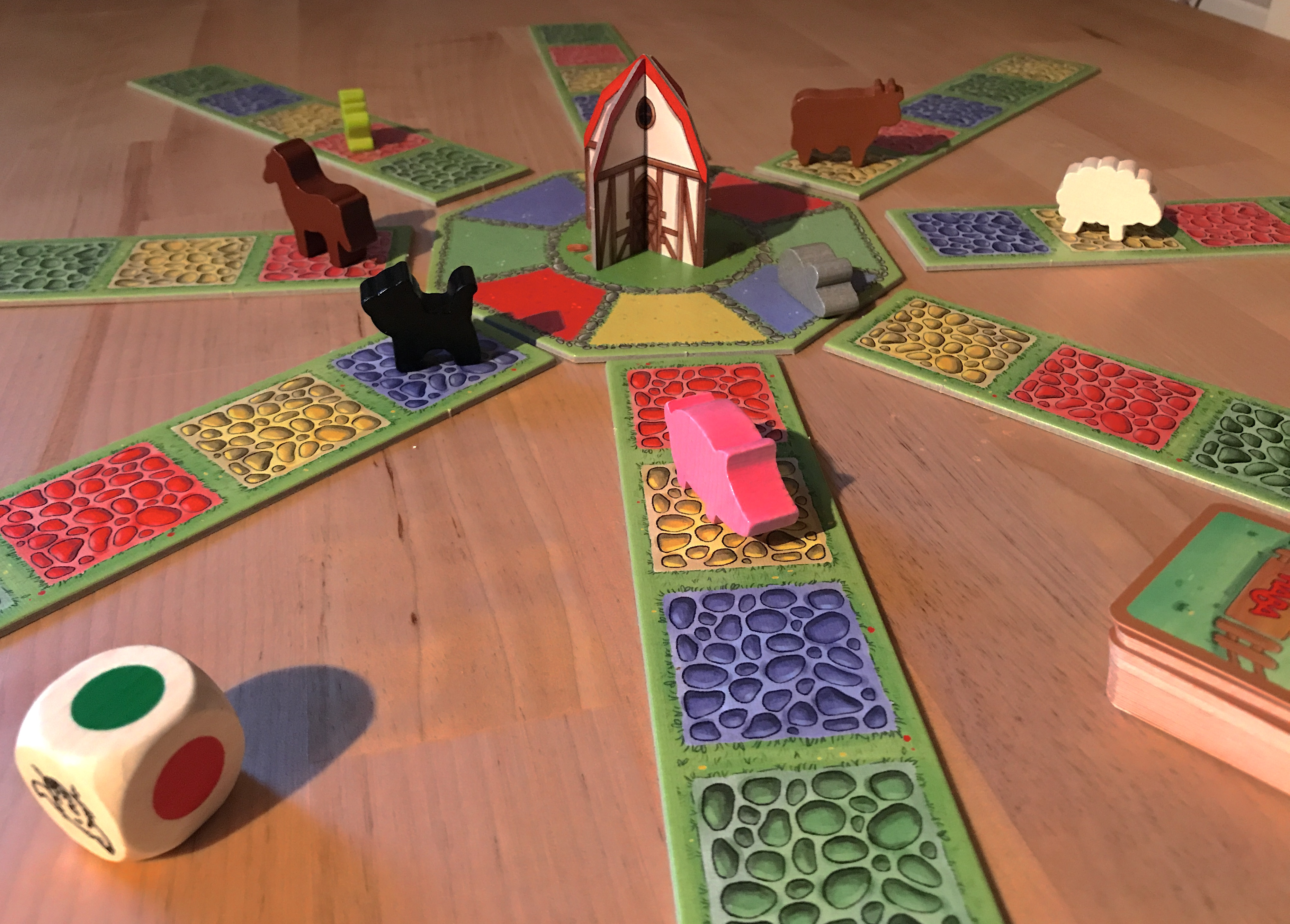 Bauernhof-Bande, Spielmaterial